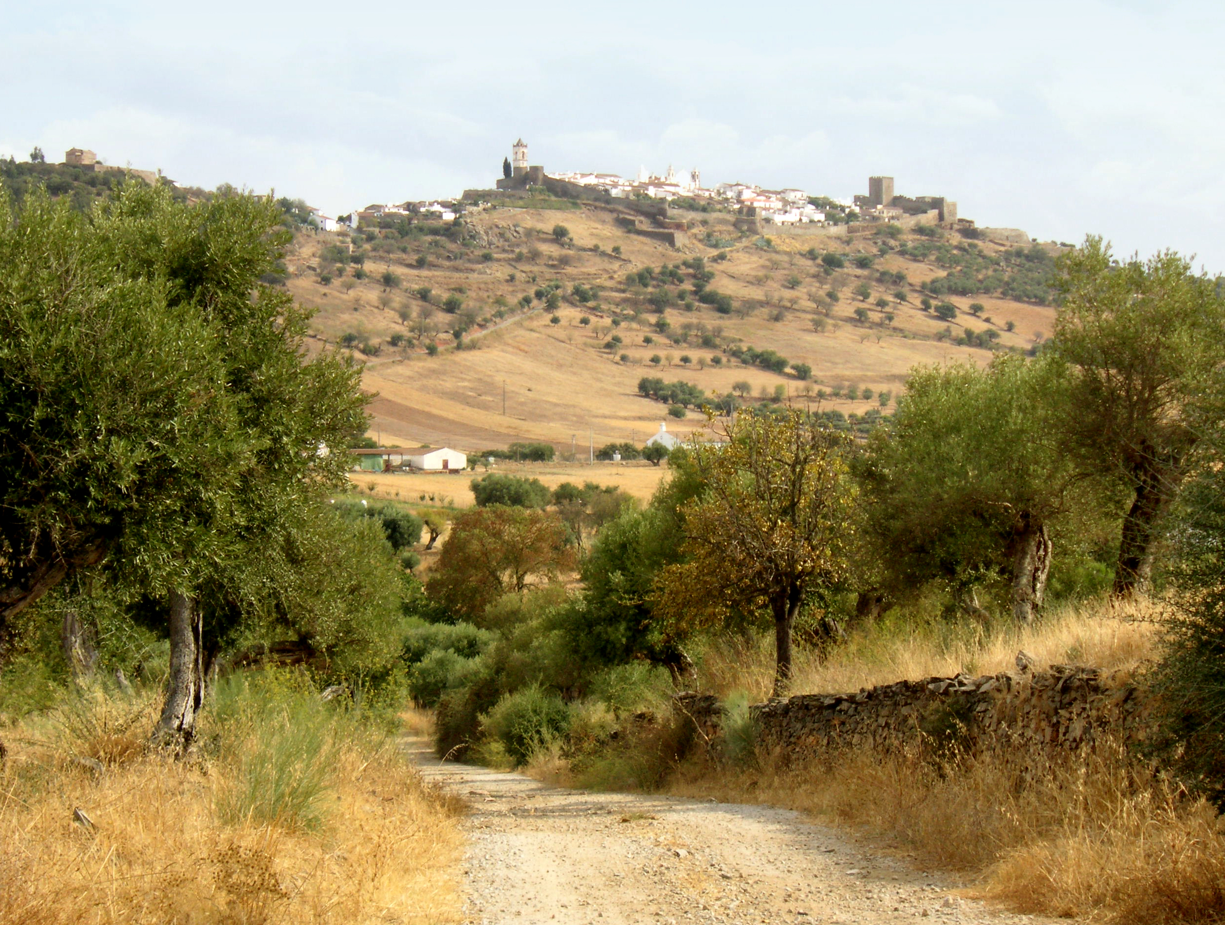 Blick auf Monsaraz bei Évora, Portugal